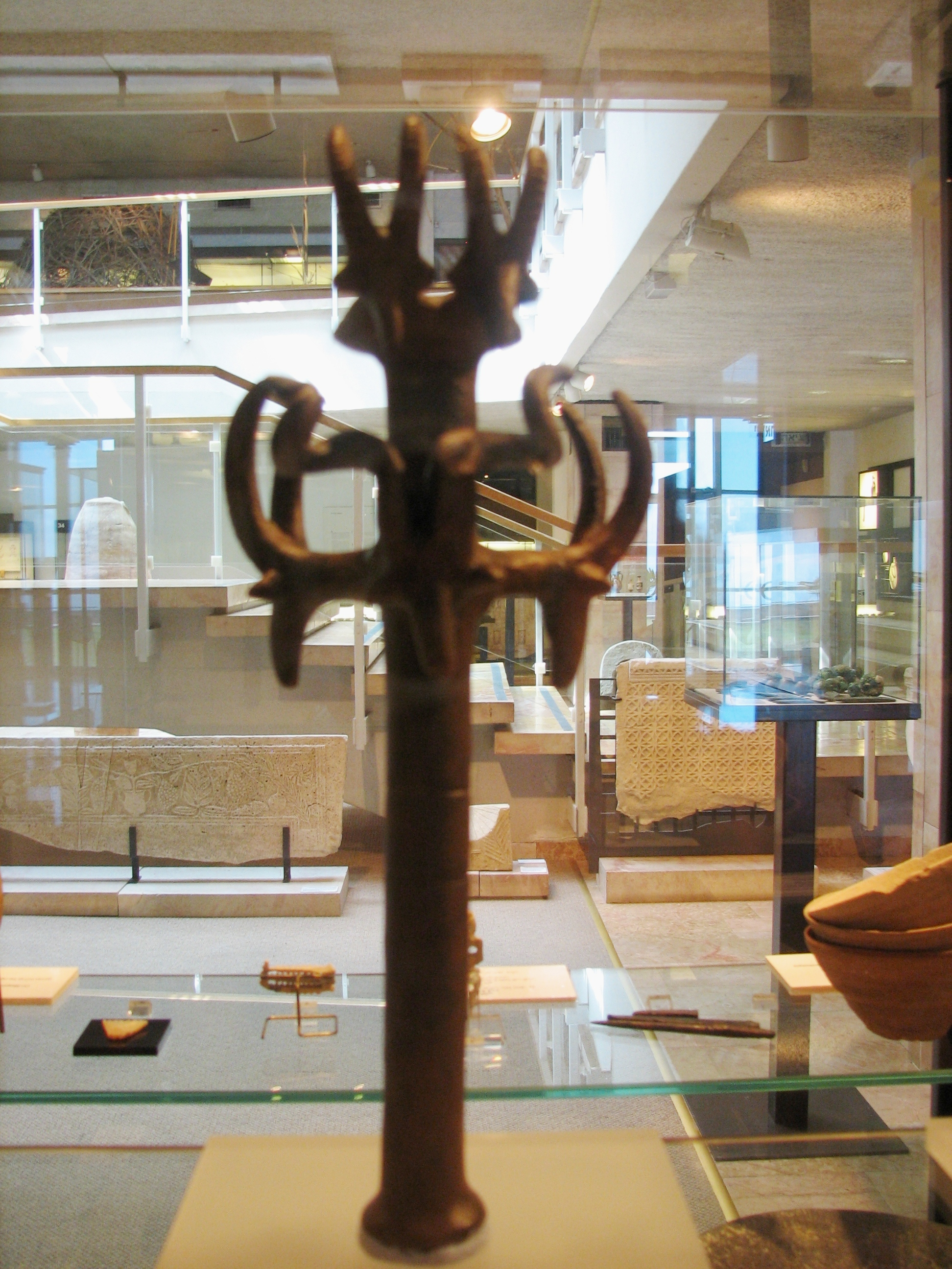 Treasure of Nahal Mishmar is a hoard of Chalcolithic artifacts discovered in a cave on the northern side of Nahal Mishmar. The hoard included 432 copper, bronze, ivory and stone decorated objects; 240 mace heads, about 100 scepters, 5 crowns, powder horns, tools and weapons מטמון נחל משמר התגלה בשנת 1961 במערה בנחל משמר במדבר יהודה בעקבות מבצע חיפוש של מגילות גנוזות. נמצאו ממצאים מהתקופה הכלקוליתית שכללו 442 חפצים, מהם 429 מנחושת, ובהם שרביטים וכלי שנהב, שישה חפצים מהמטיט, אחד מאבן, חמישה מניב של היפופוטם ואחד מחט של פיל. שרביט היעלים מנחושת – מוזיאון הכט חיפה, העתק